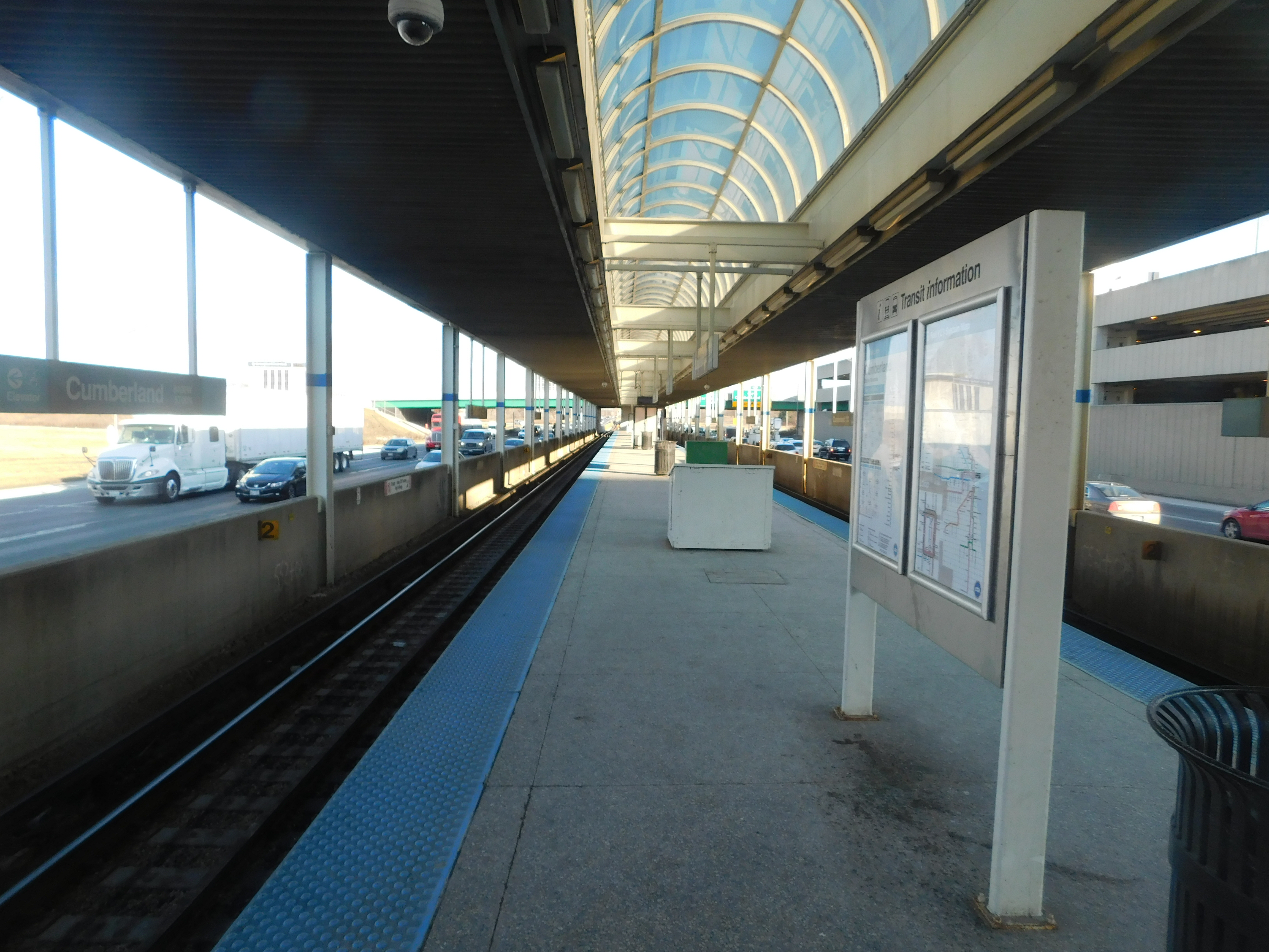 Chicago, Illinois